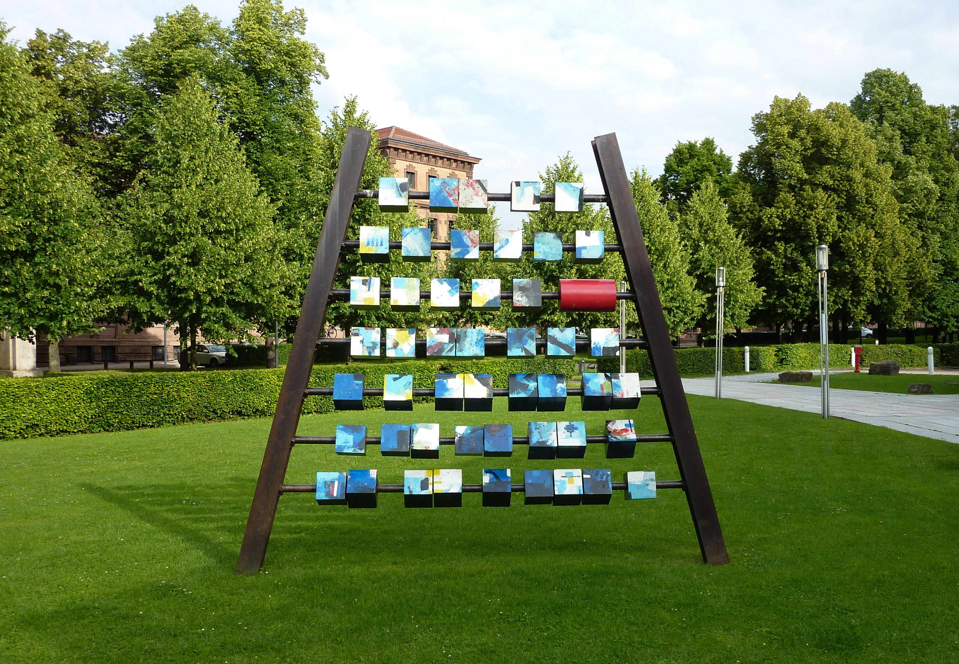 Abakus vor dem Forum am Schlosspark in Ludwigsburg. Das Kunstwerk wurde im Sinne der Städtepartnerschaft für Europa, von den Bürgern in Zusammenarbeit mit Grete Werner-Wesner, Michel Loth und Christian Florio im Jahr 2000 erstellt.